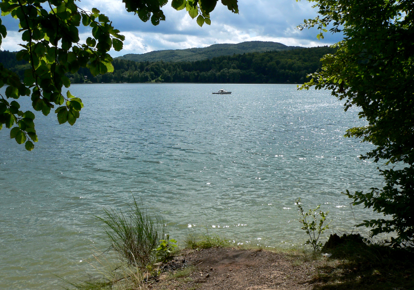 Edersee, im Hintergrund der Peterskopf